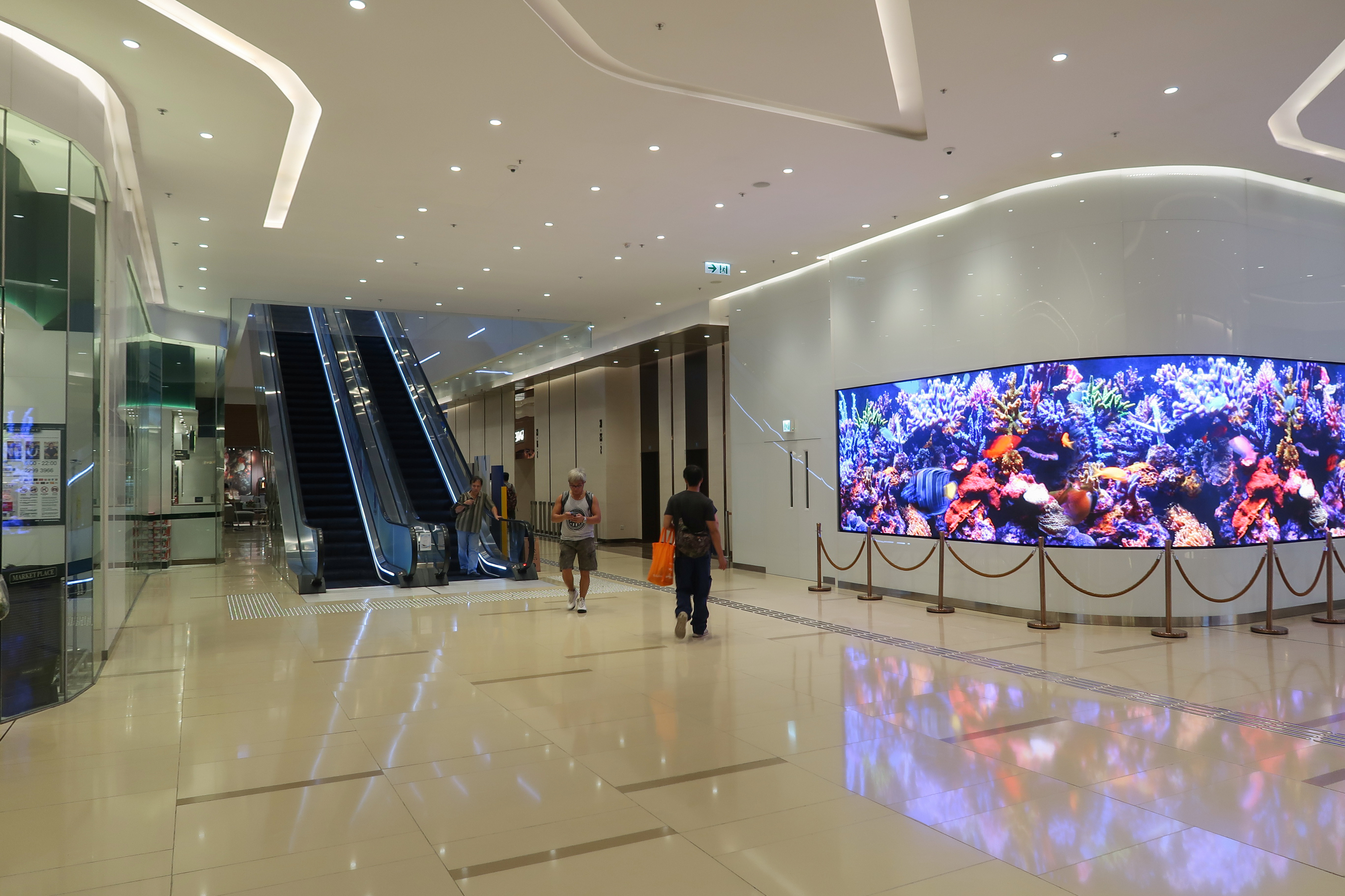 eightandahalf